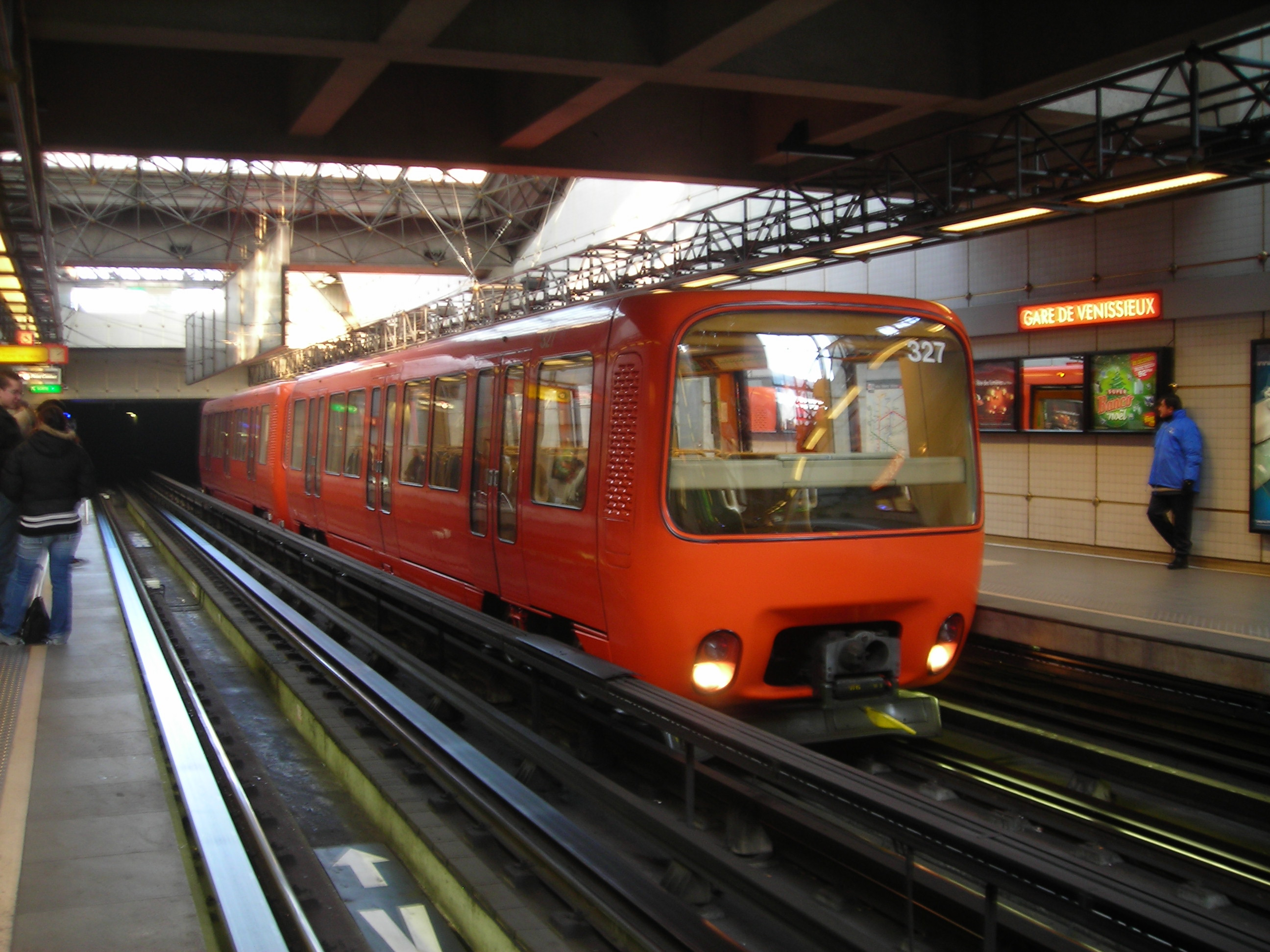 Station "Gare de Vénissieux", terminus de la ligne D du métro de Lyon avec une rame MPL85.